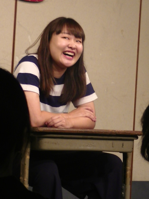 吉住 (お笑い芸人) 2018年9月